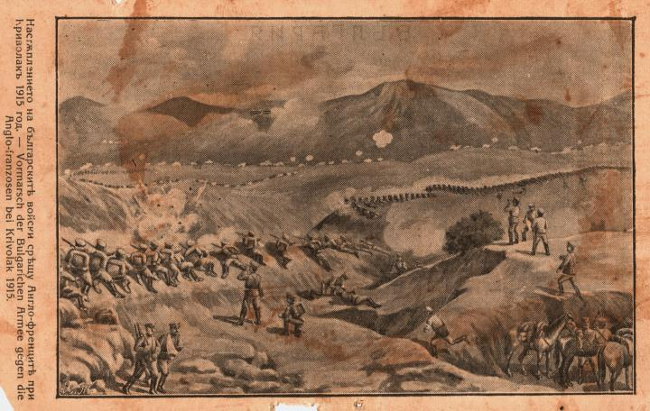 Криволашкото сражение, 1915 г.